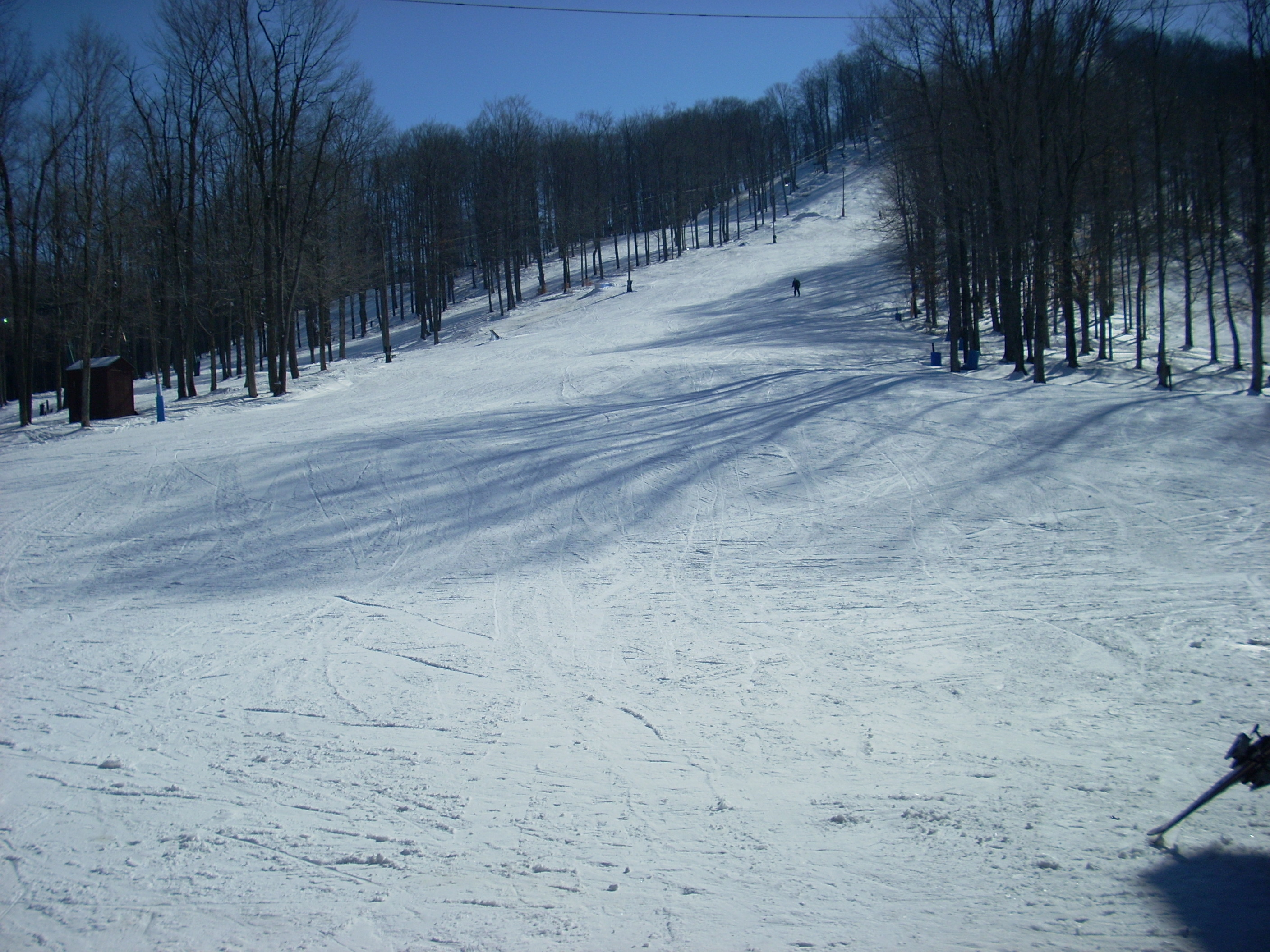 Ski slope at Denton Hill State Park